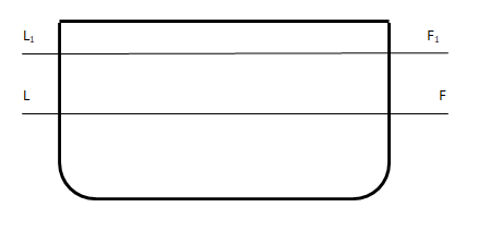 Ontzi baten sekzio transbertsala (sekzio nagusia) bi kalatu desberdinetan